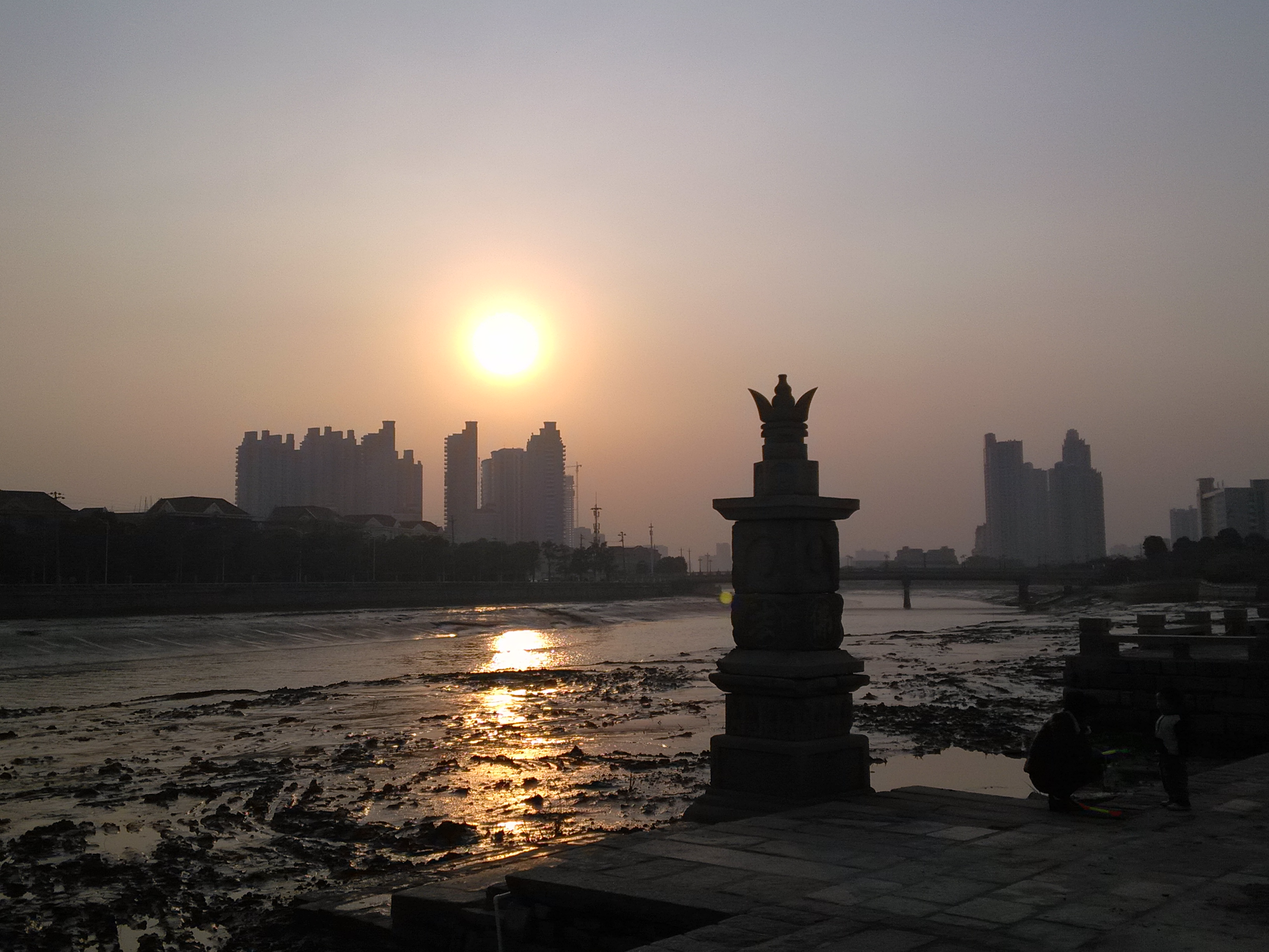 中文（中国大陆）: Wenxing Pier, Quanzhou